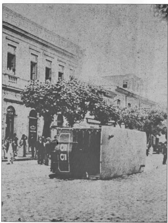 Bonde virado na Praça da República durante a Revolta da Vacina em novembro de 1904 na cidade do Rio de Janeiro-RJ.